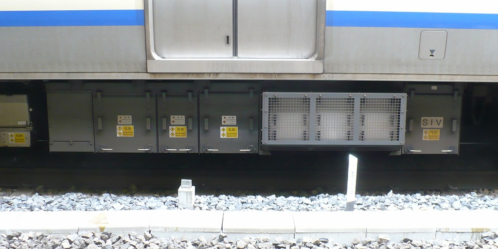 JRE217形電車機器